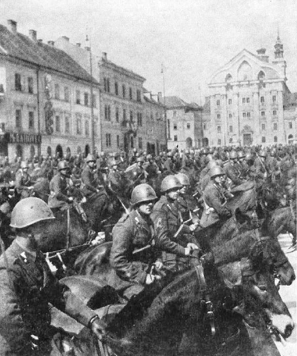 Italijanska vojska na proslavi na kongresnem trgu